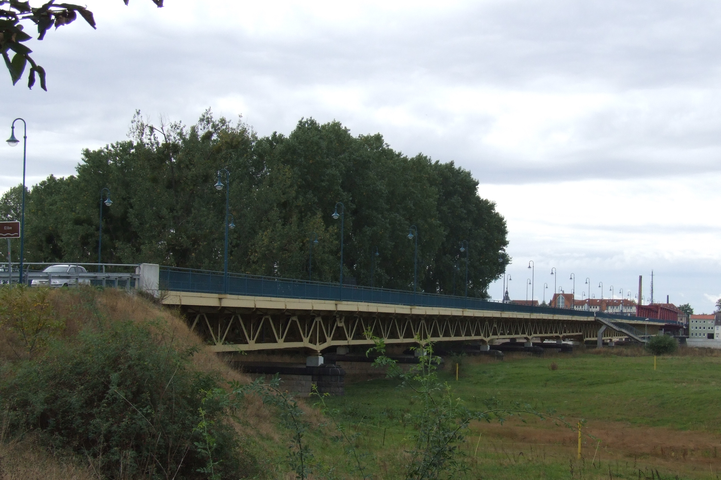 Elbbrücke in Schönebeck 2006 Fotograf: Harald Rossa Datum: 3. Oktober 2006 Höher aufgelöste Version ist verfügbar